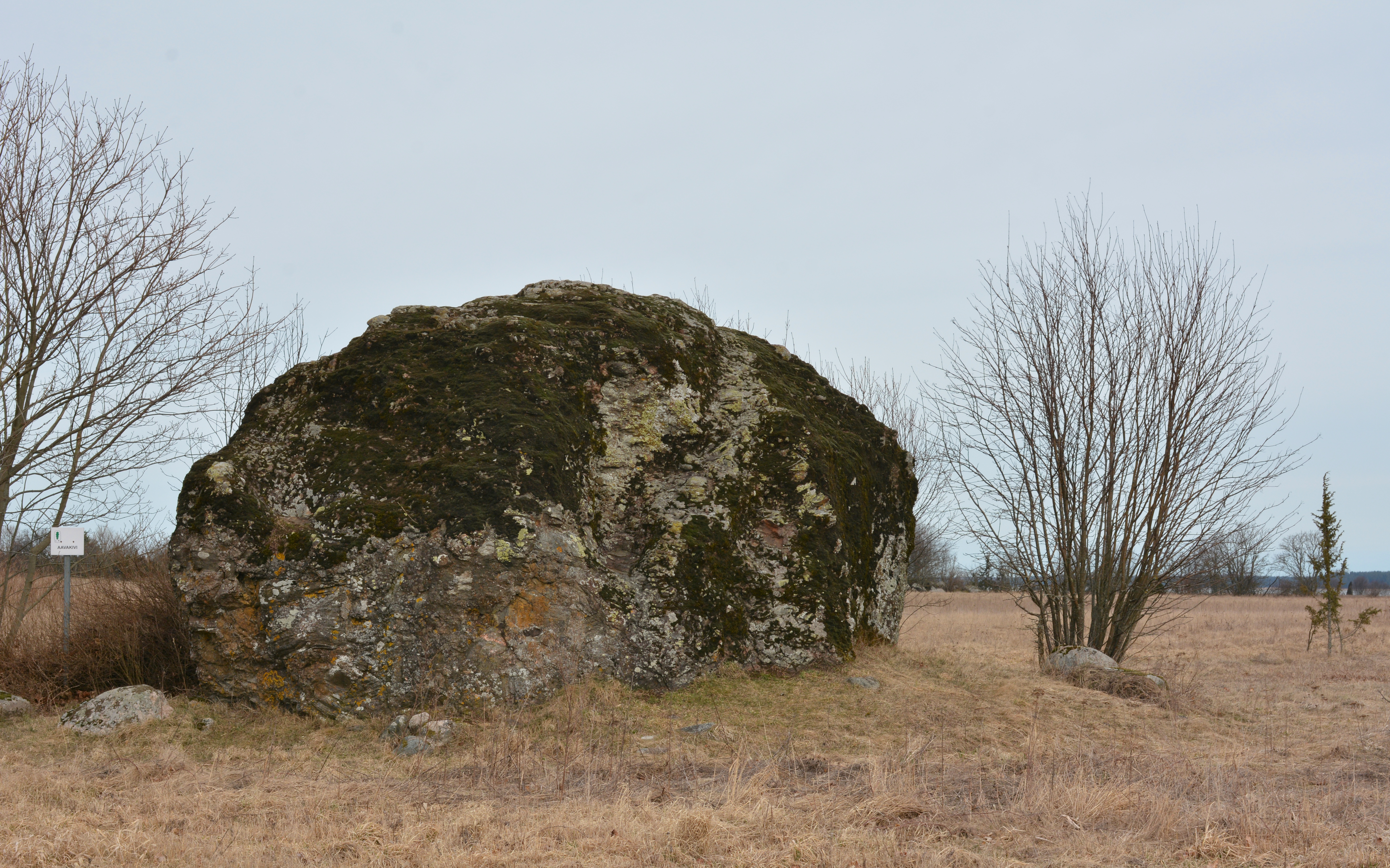 Kõrkvere küla, Pöide vald